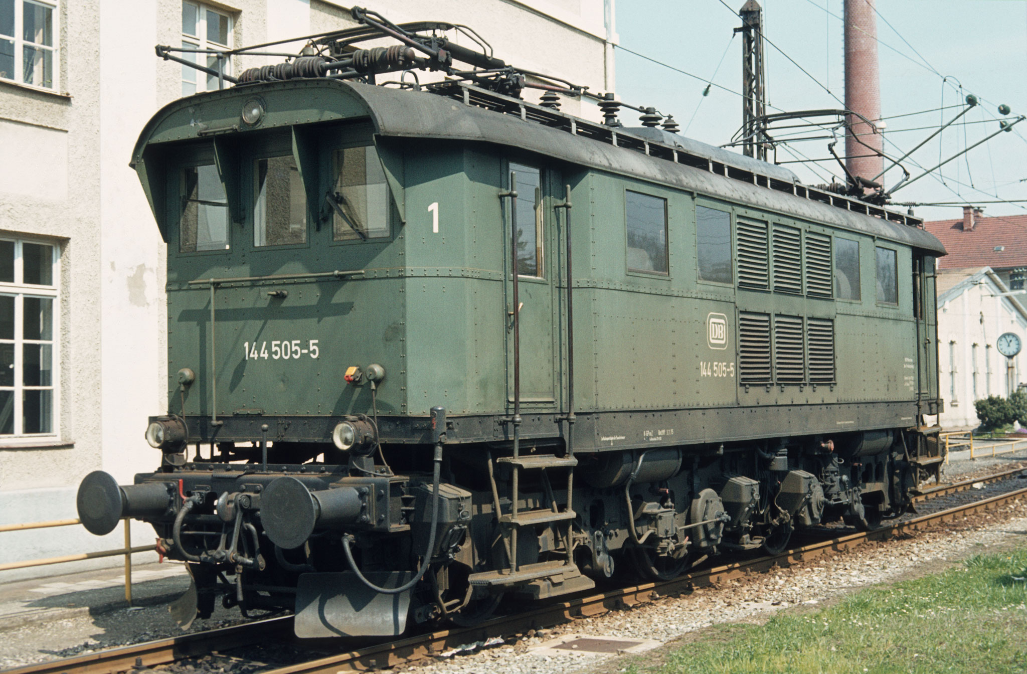 144 505-5 während einer Betriebspause im Heimat-Bahnbetriebswerk Freilassing, 21.04.1979.